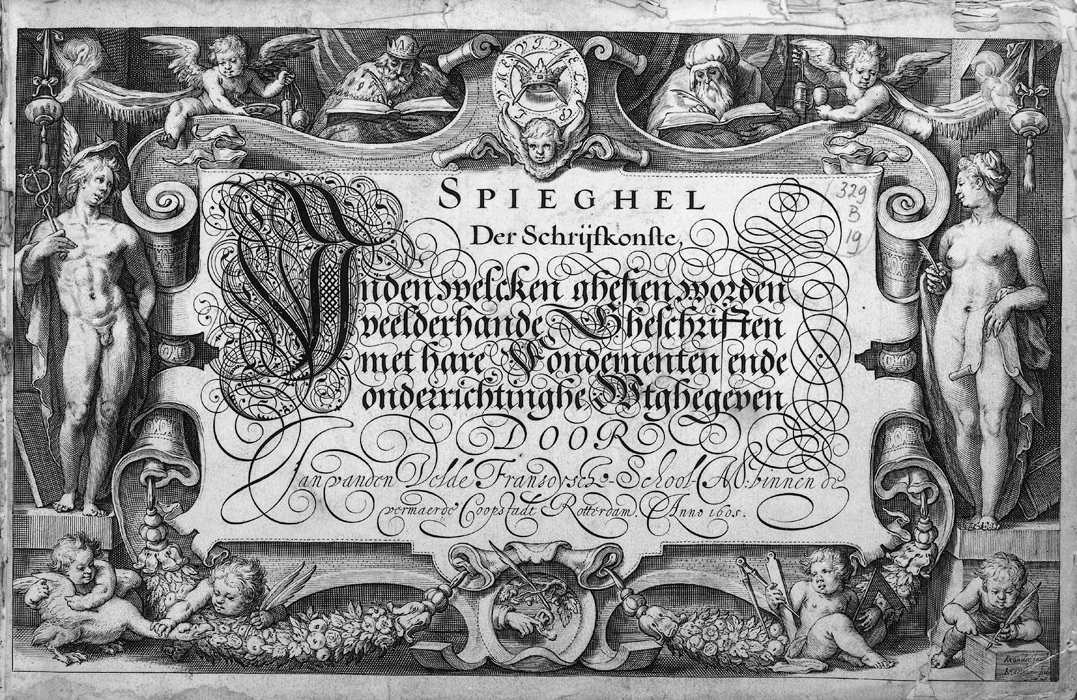 Title page of the book "Mirror of the Art of Writing" Spieghel der schrijfkonste, in den welcke ghesien worden veelderhande Gheschriften met hare Fondementen ende onderrichtinghe Wtghegeven